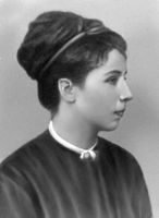 Elisabeth Dmitrieff (1851-ca 1918)